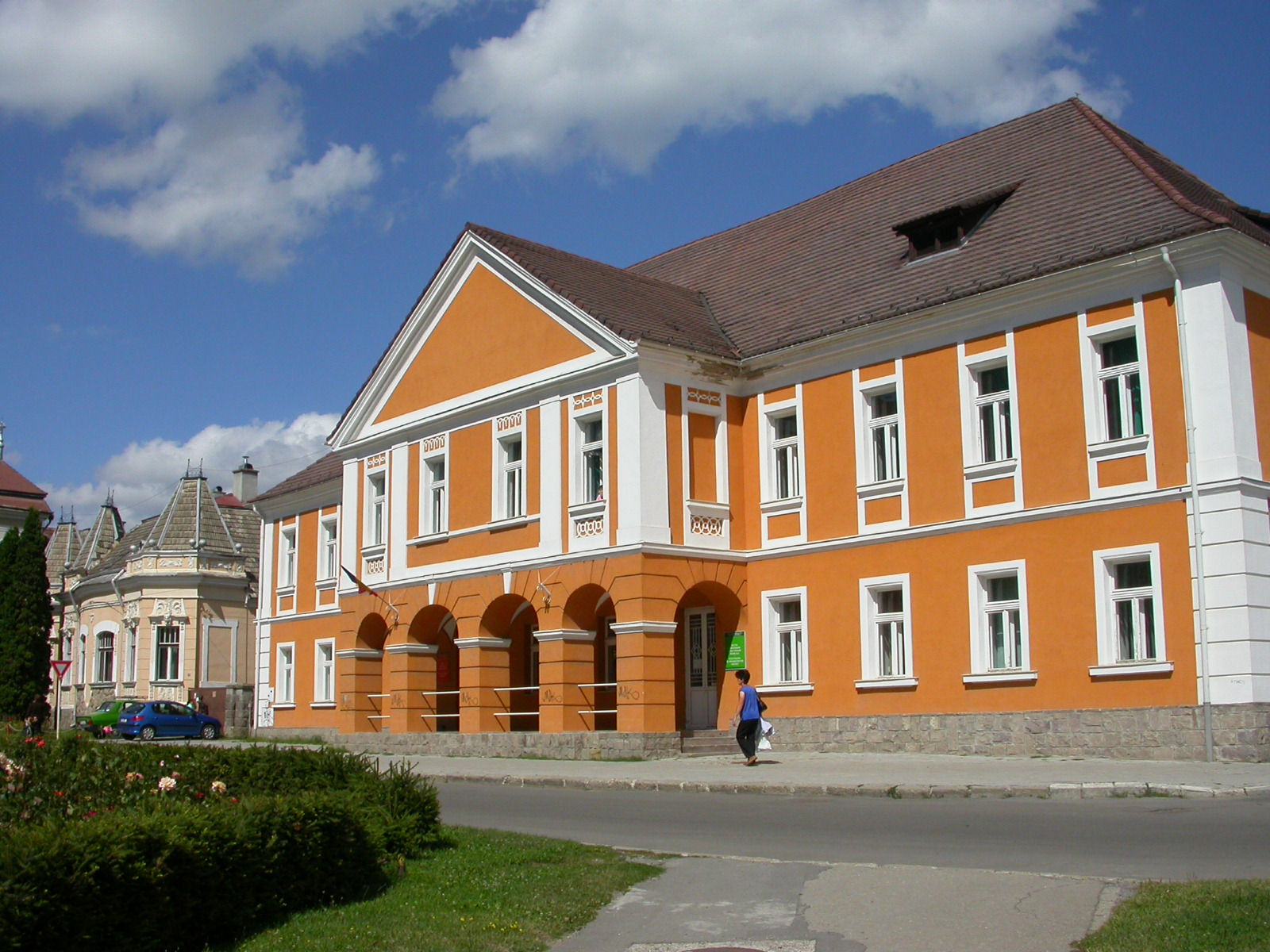 Reședința garnizoanei de grăniceri nr. 1, azi spital ORL și Fizioterapie, 1786, cca. 1826